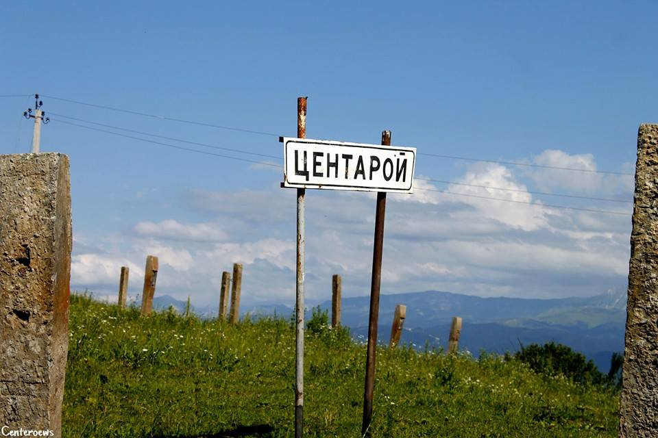 Въезд в Центорой This file, which was originally posted to was reviewed on 11 December 2016 by reviewer INeverCry, who confirmed that it was available there under the stated license on that date.